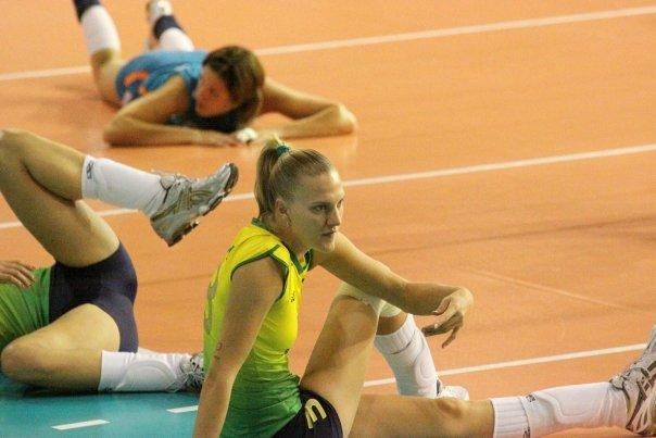 Marianne Steinbrecher, pallavolista brasiliana, gioca nel ruolo di schiacciatrice